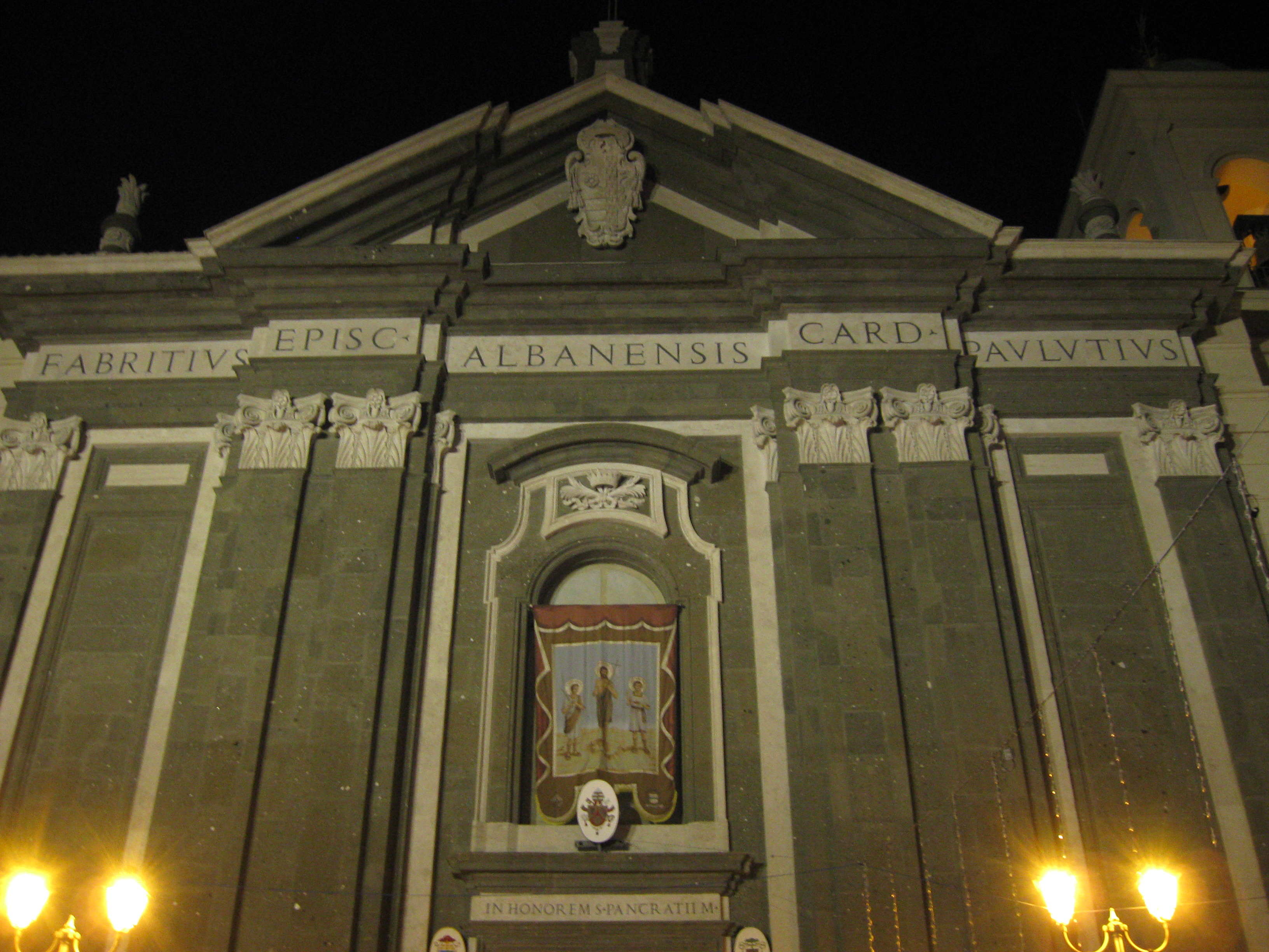 La Cattedrale di San Pancrazio ad Albano Laziale